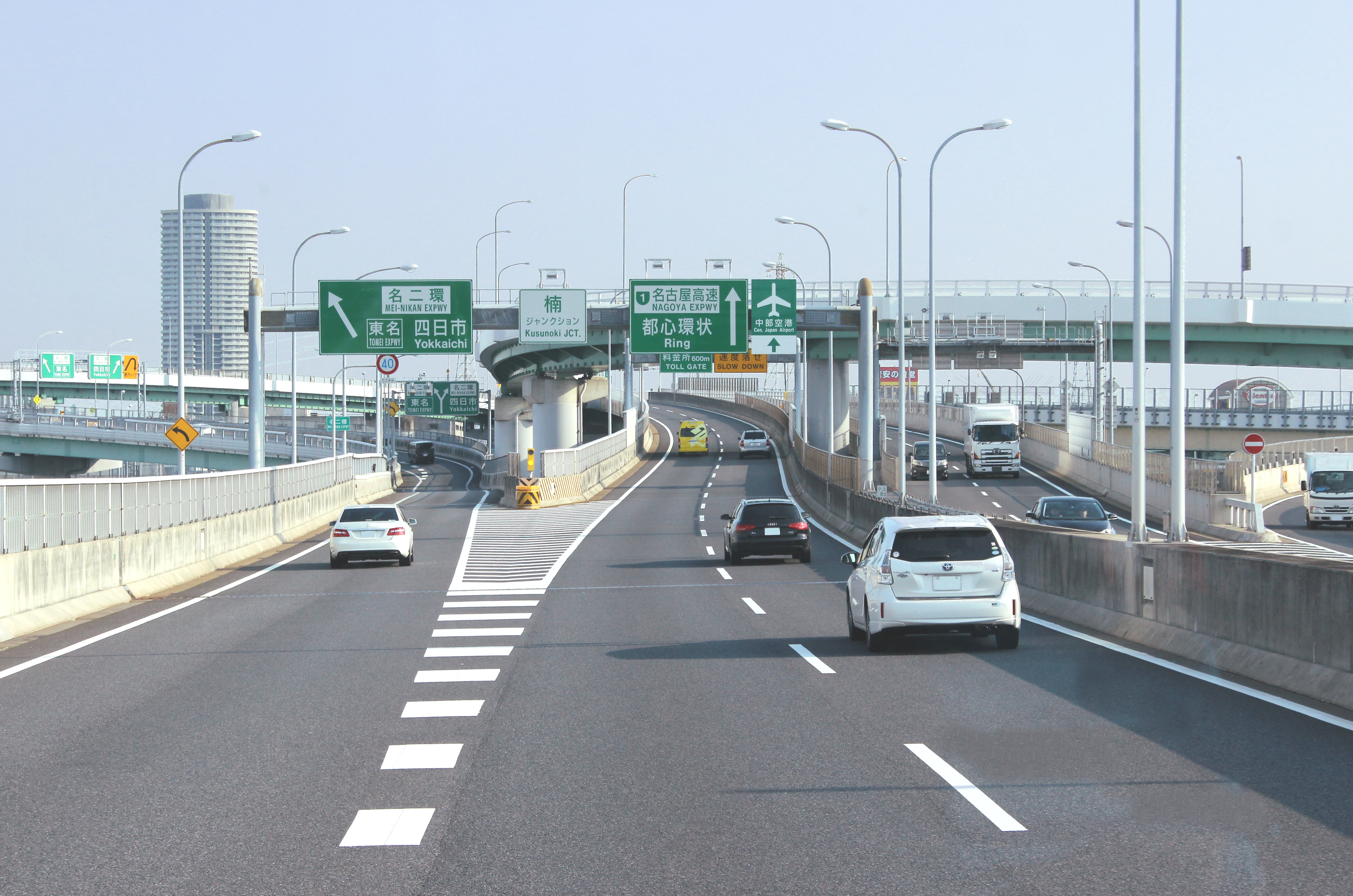 楠JCT。名古屋高速11号小牧線から都心方向を臨む。